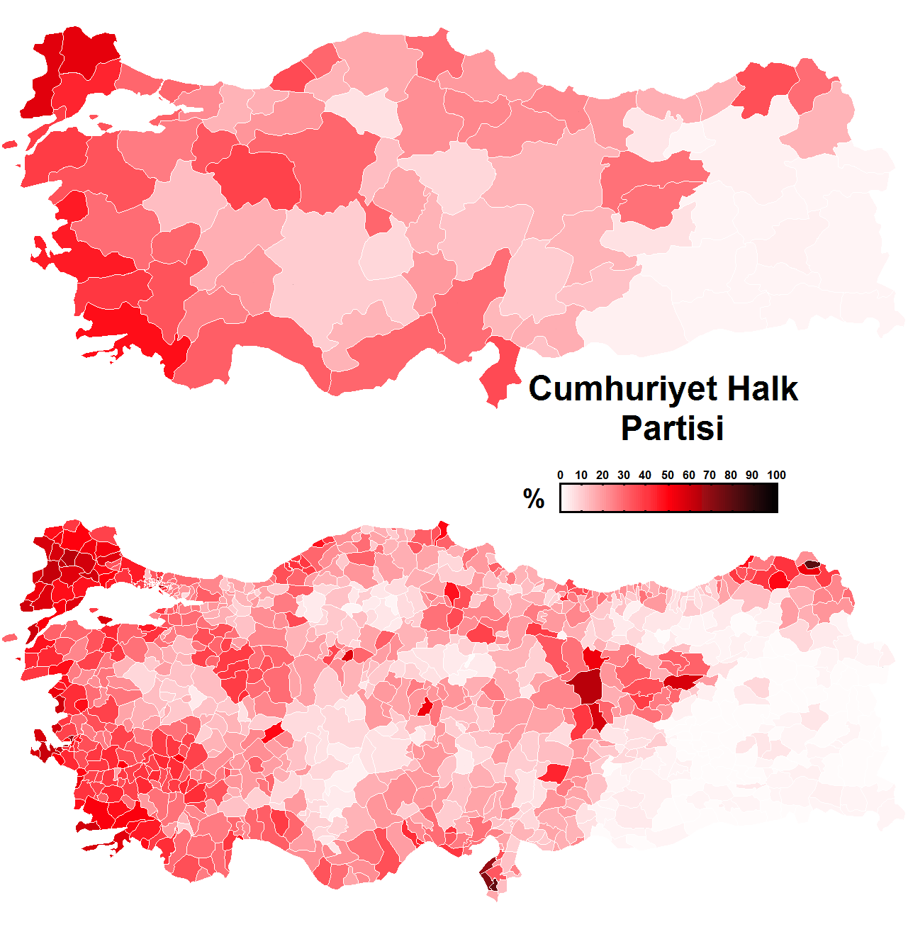 Cumhuriyet Halk Partisi'nin il ve ilçe bazında oy oranlarının yoğunluğunu gösteren harita